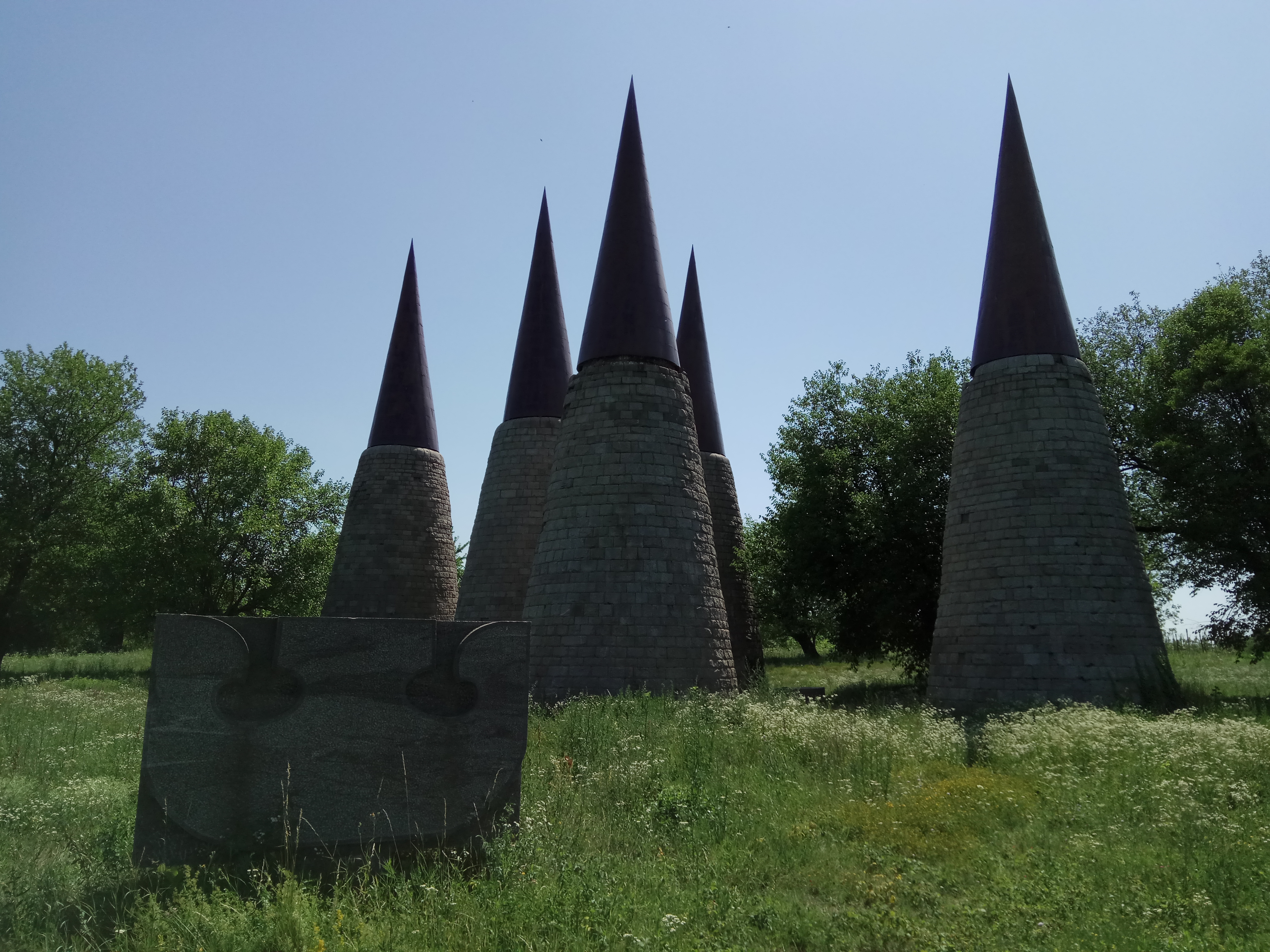 Spomen park Dudik